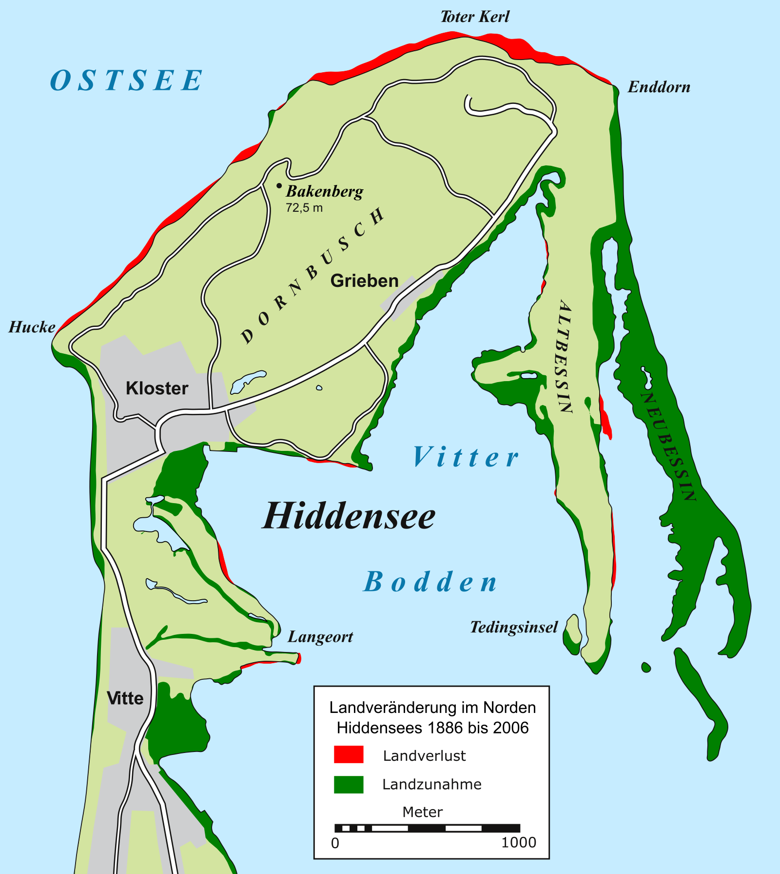 Karte der Landzunahme und des Landverlustes der Insel Hiddensee von 1886 bis 2006